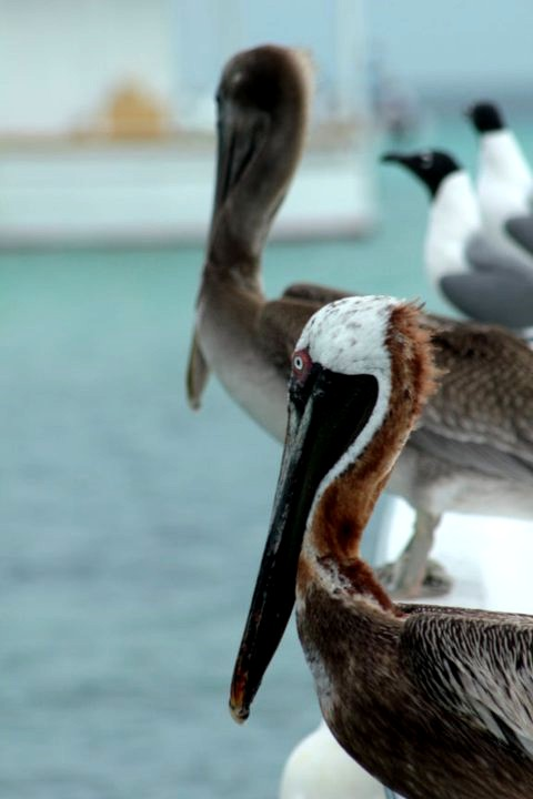 Alcatraz (Pelicanus occidentalis) de los Roques Venezuela 000